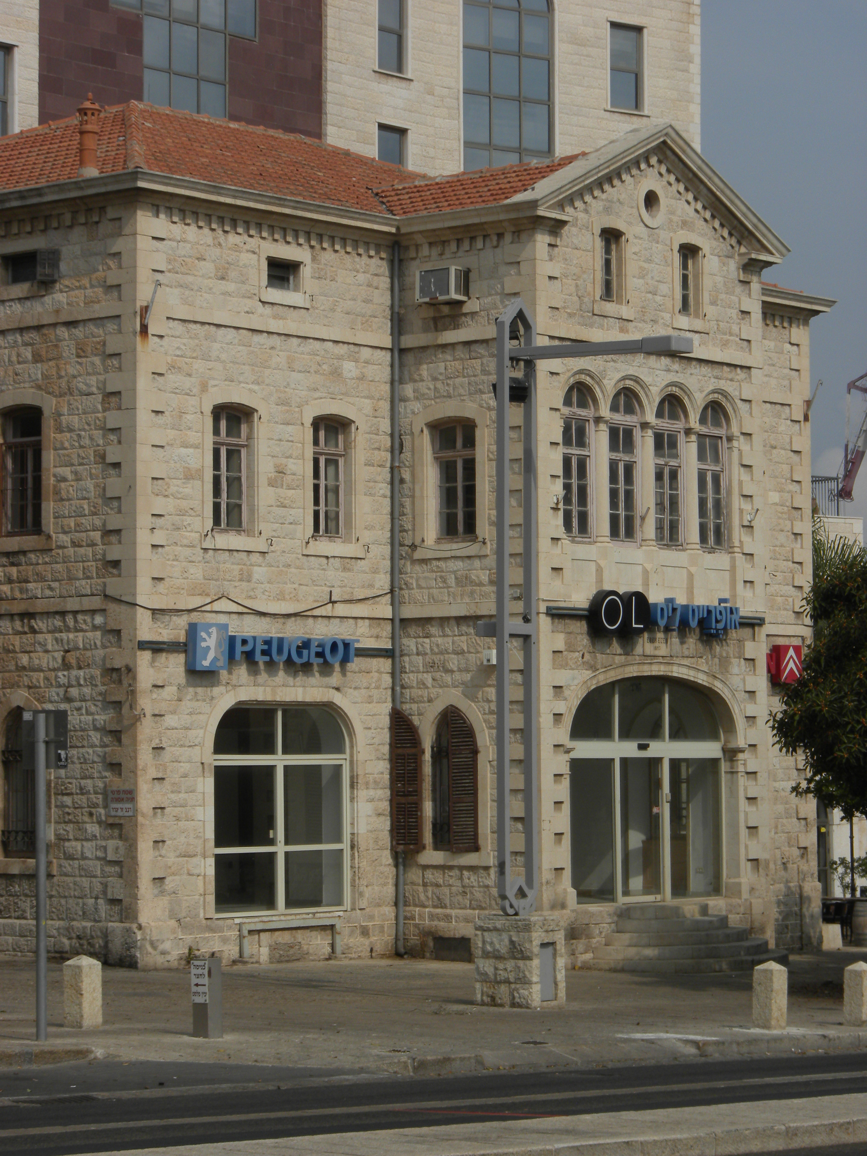 בית דיק במושבה הגרמנית בחיפה